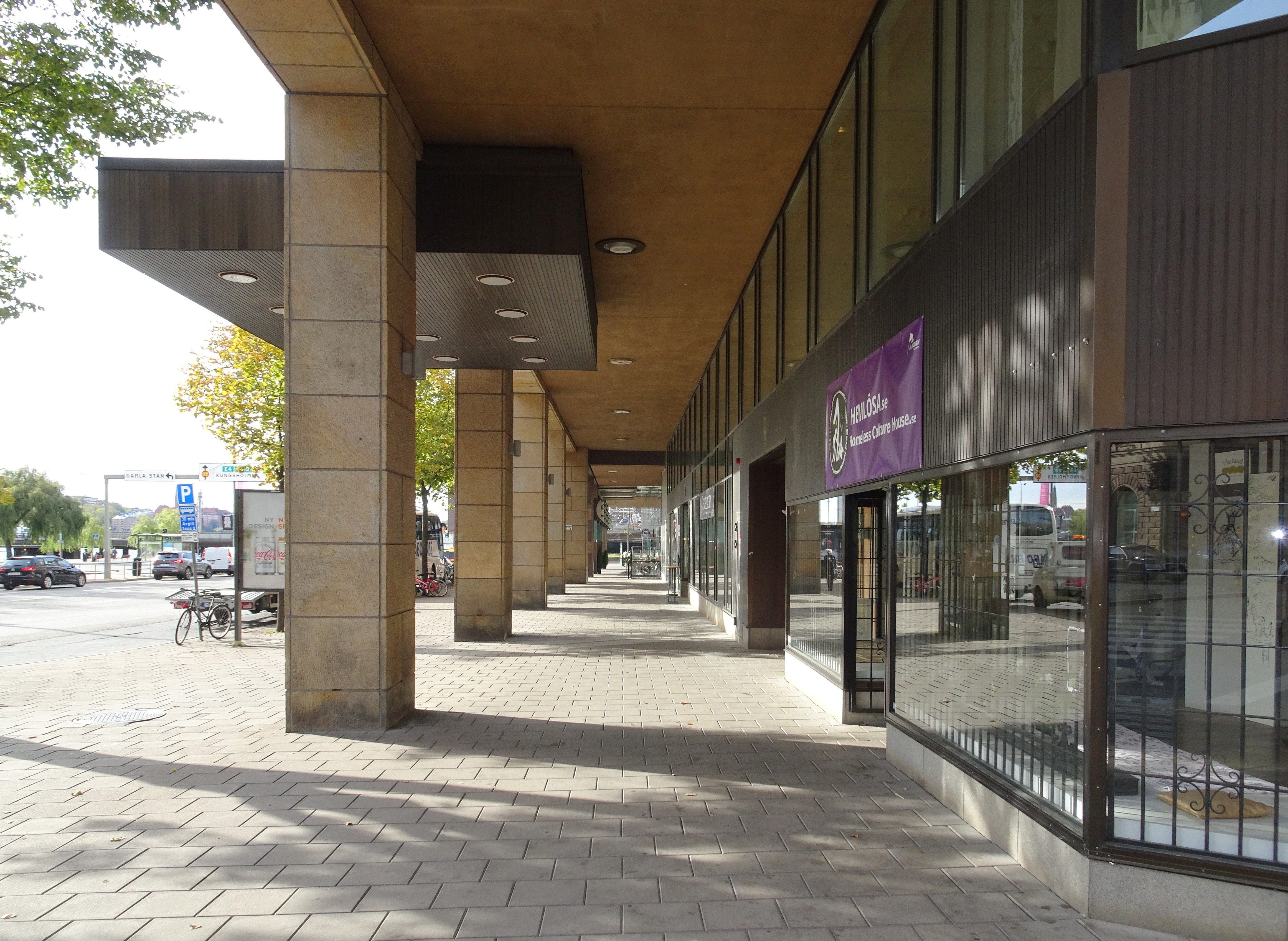 Kontorsfastigheten Snäckan 8 (Tegelbacken 4) byggt 1970-72. Arkitekt Erik Thelaus.